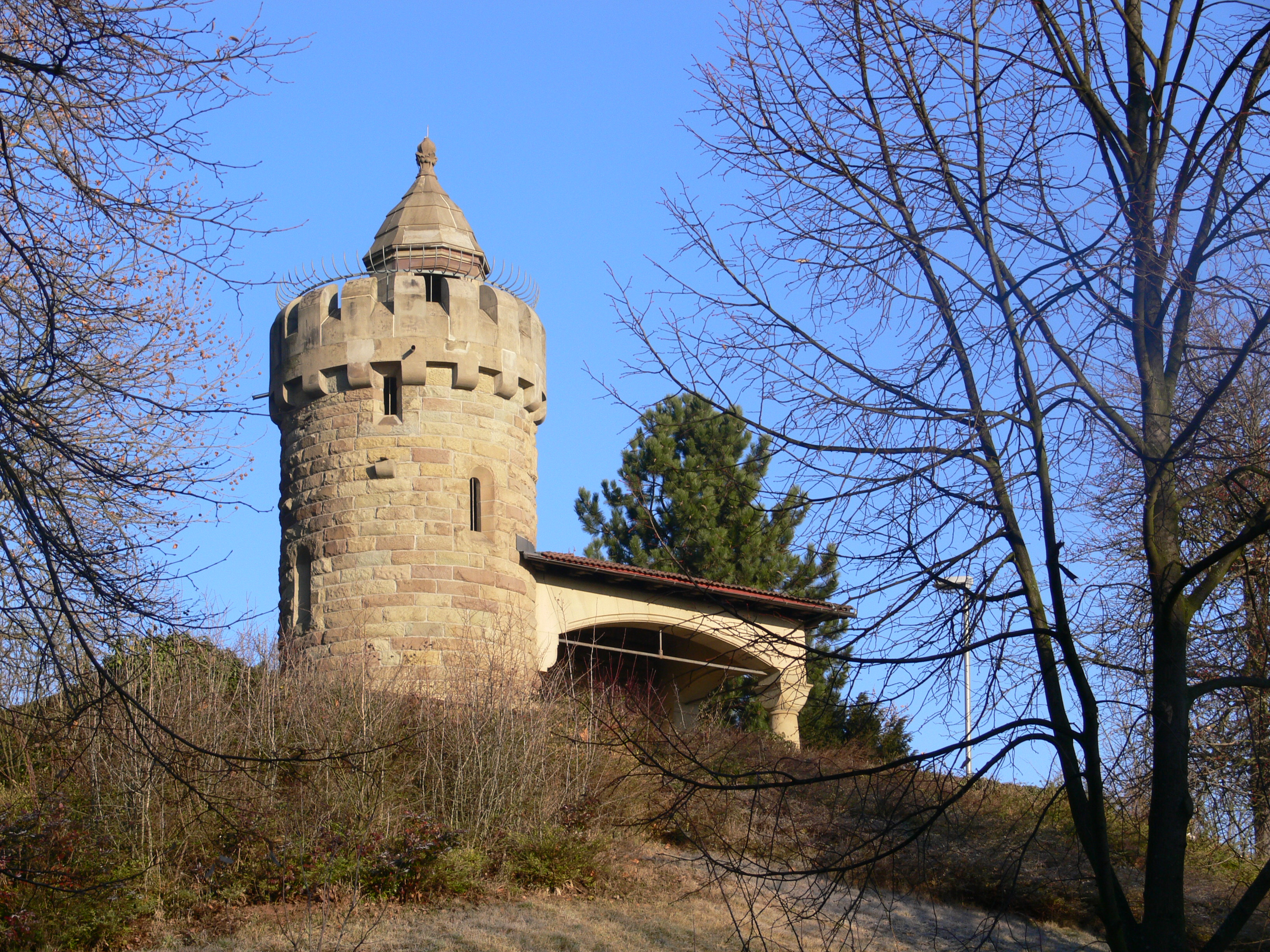 Kriegsbergturm, Stuttgart-Nord, erbaut 1895 von Karl Weigle für den Verschönerungsverein Stuttgart